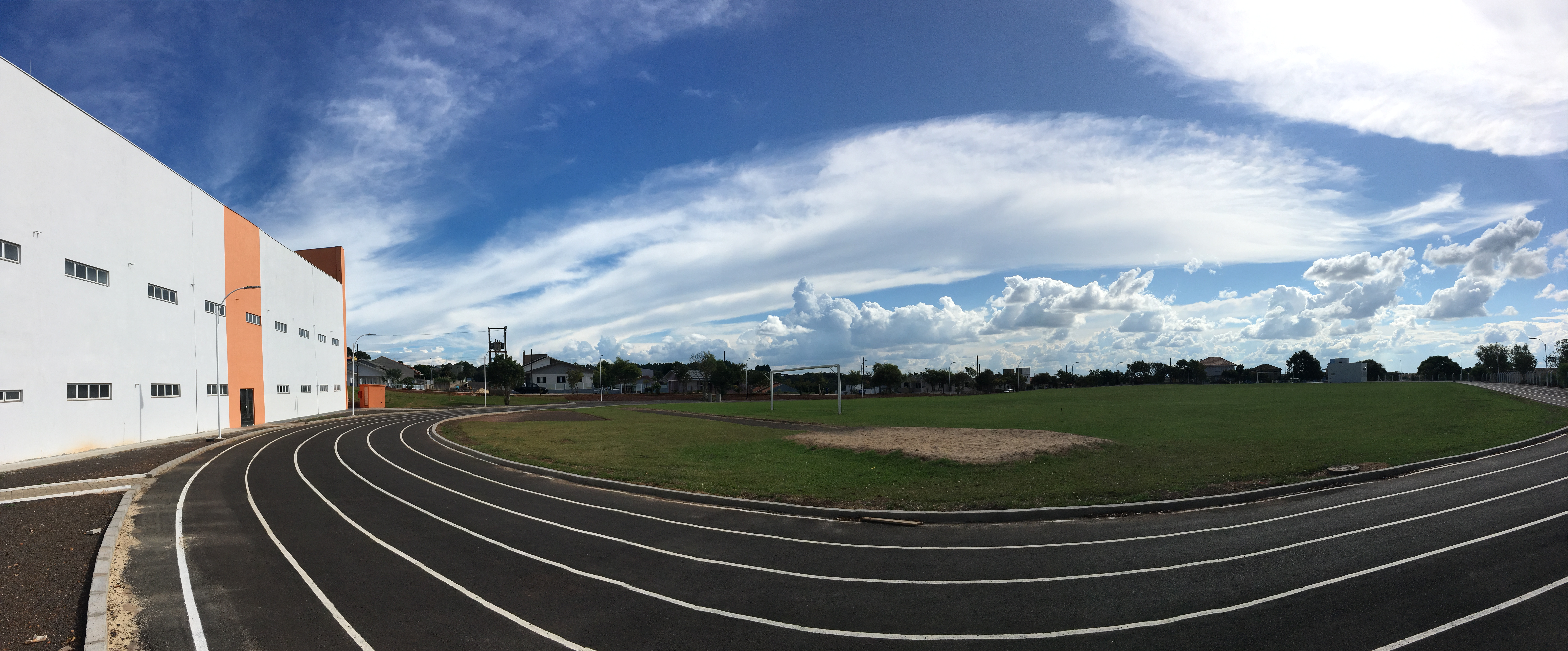 Complexo Esportivo Faxinal dos Guedes